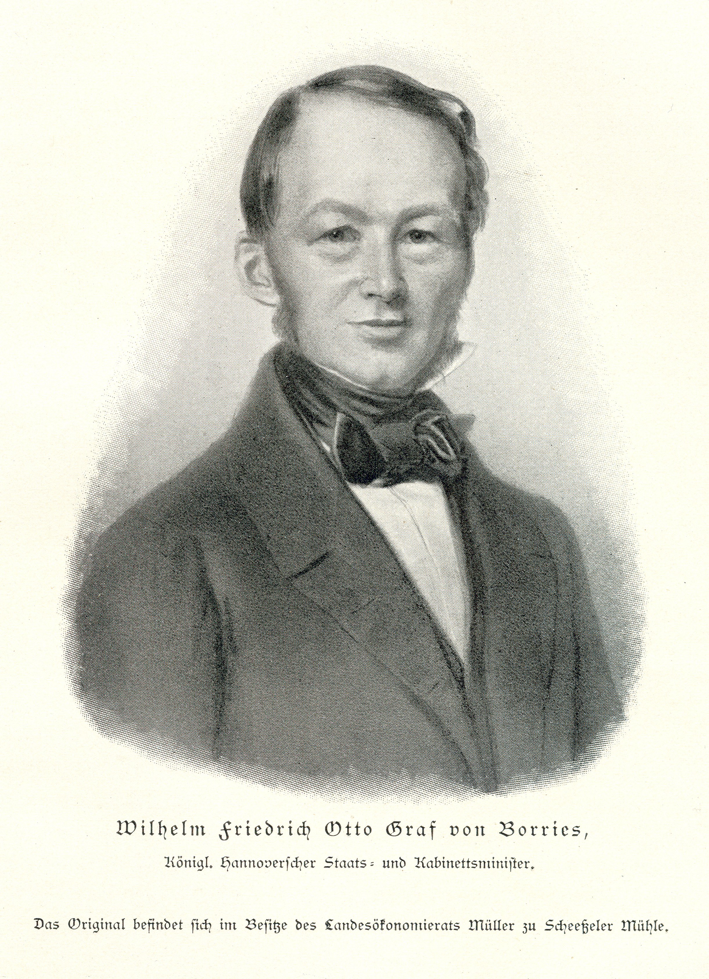 Abbildung eines Portraits des Wilhelm Friedrich Otto Graf von Borries, Königlicher Hannoverscher Staats- und Kabinettsminister. Dieser Ausschnitt aus dem nicht numerierten Blatt zwischen Seite 316 und 317 im Buch von William von Hassell: Geschichte des Königreichs Hannover. Unter Benutzung bisher unbekannter Aktenstücke, Bd. 2 ( = Zweiter Teil), Leipzig: Verlag von M. Heinsius Nachfolger, 1899 enthält außerdem den Zusatz: „Das Original befindet sich im Besitze des Landesökonomierates Müller zu Scheeßeler Mühle.“ ...